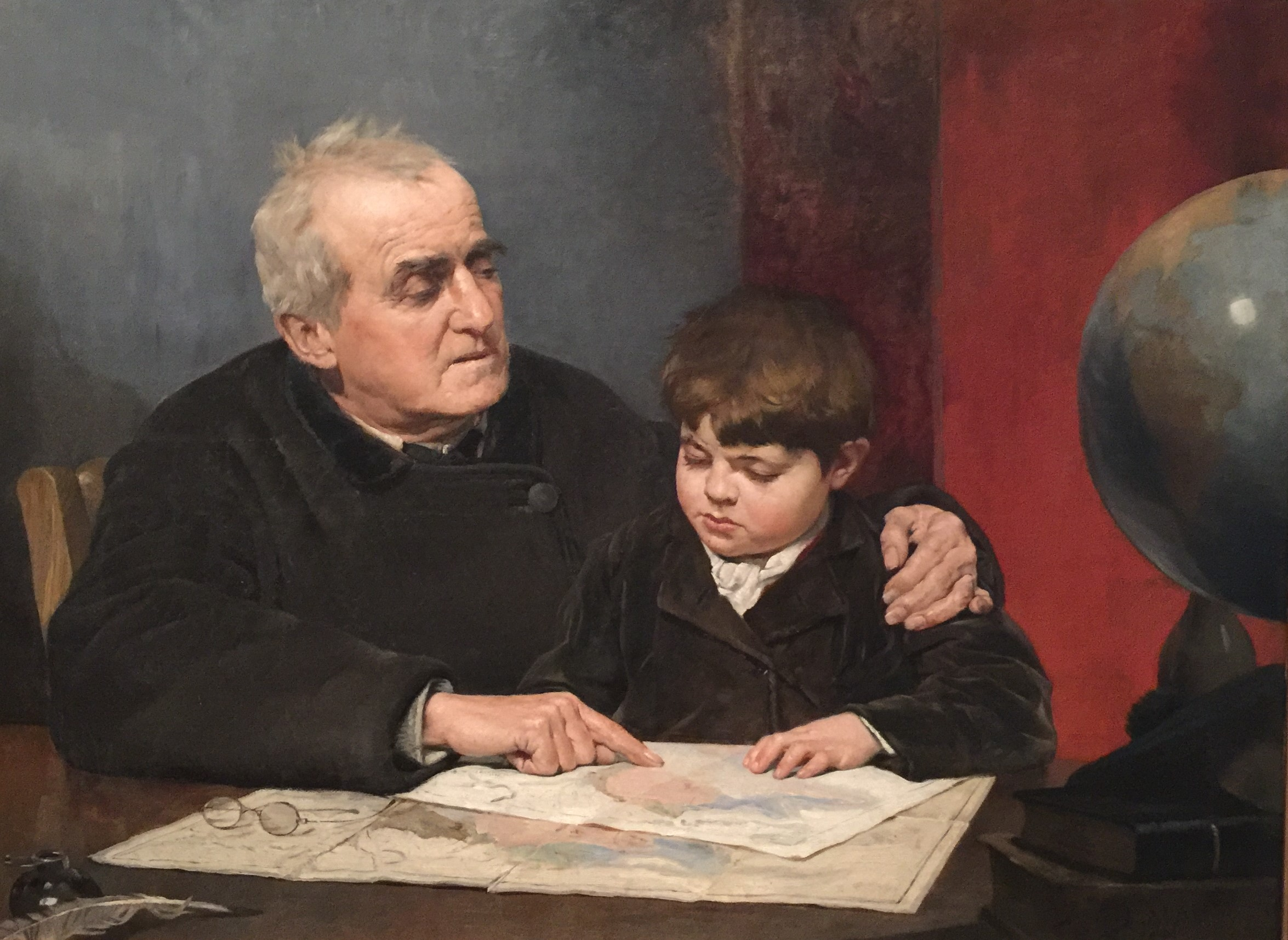 Primer cuadro original que Valenzuela Puelma envió al Gobierno de Chile desde París. Fue presentada en el Salón Nacional de 1884 junto con Flores del jardín y La Ciencia mostrando al Genio que solo ella conduce a la inmortalidad, ganando la primera medalla.